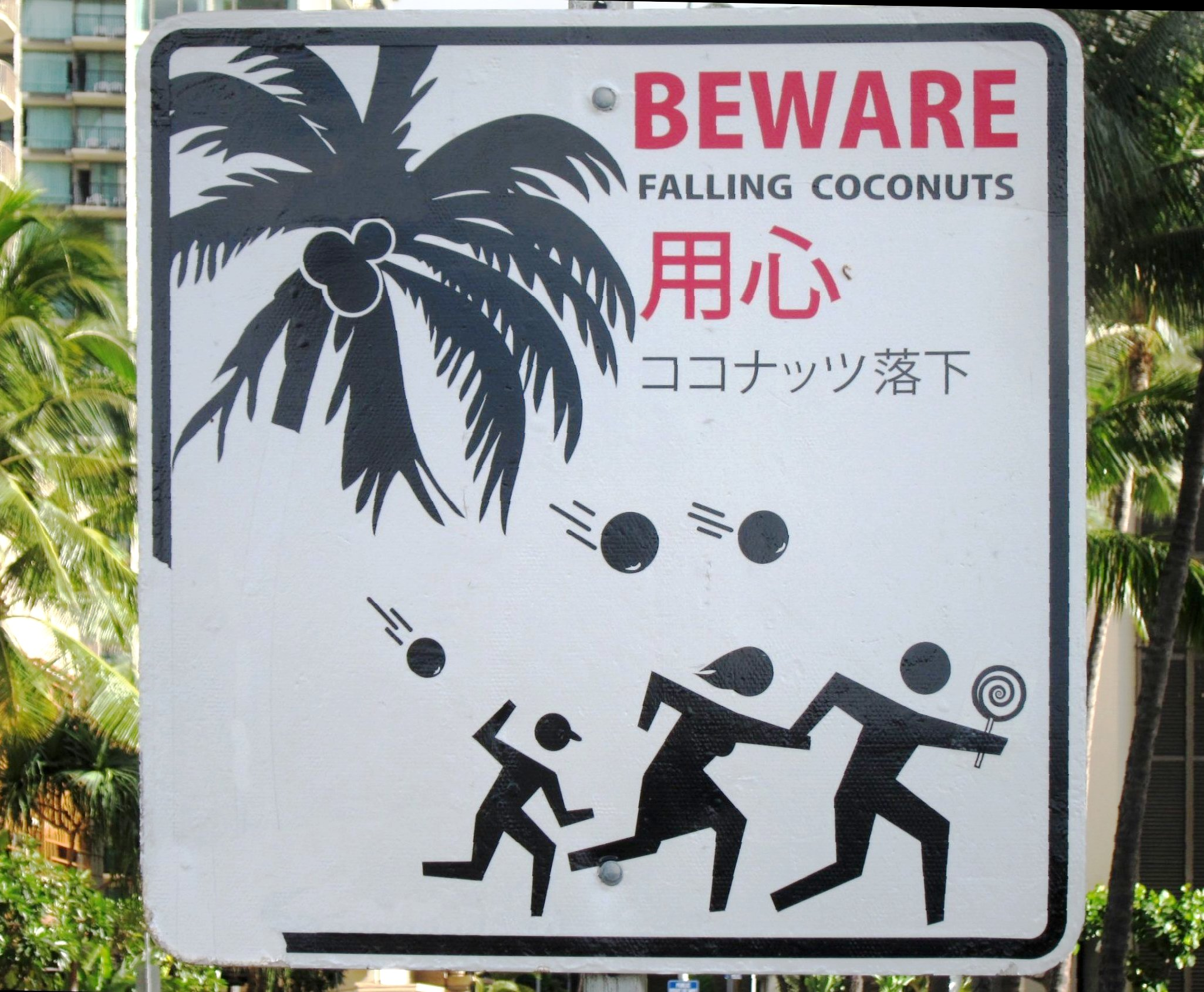 'BEWARE FALLING COCONUTS' sign in Honolulu, Hawaii